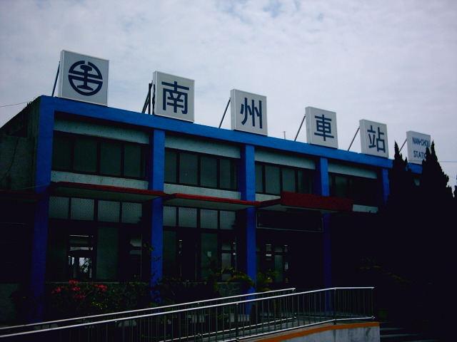 南州車站